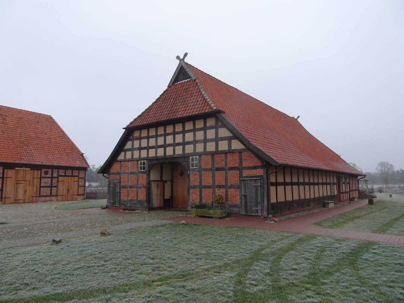 Kulturgut Ehmken Hoff in Dörverden